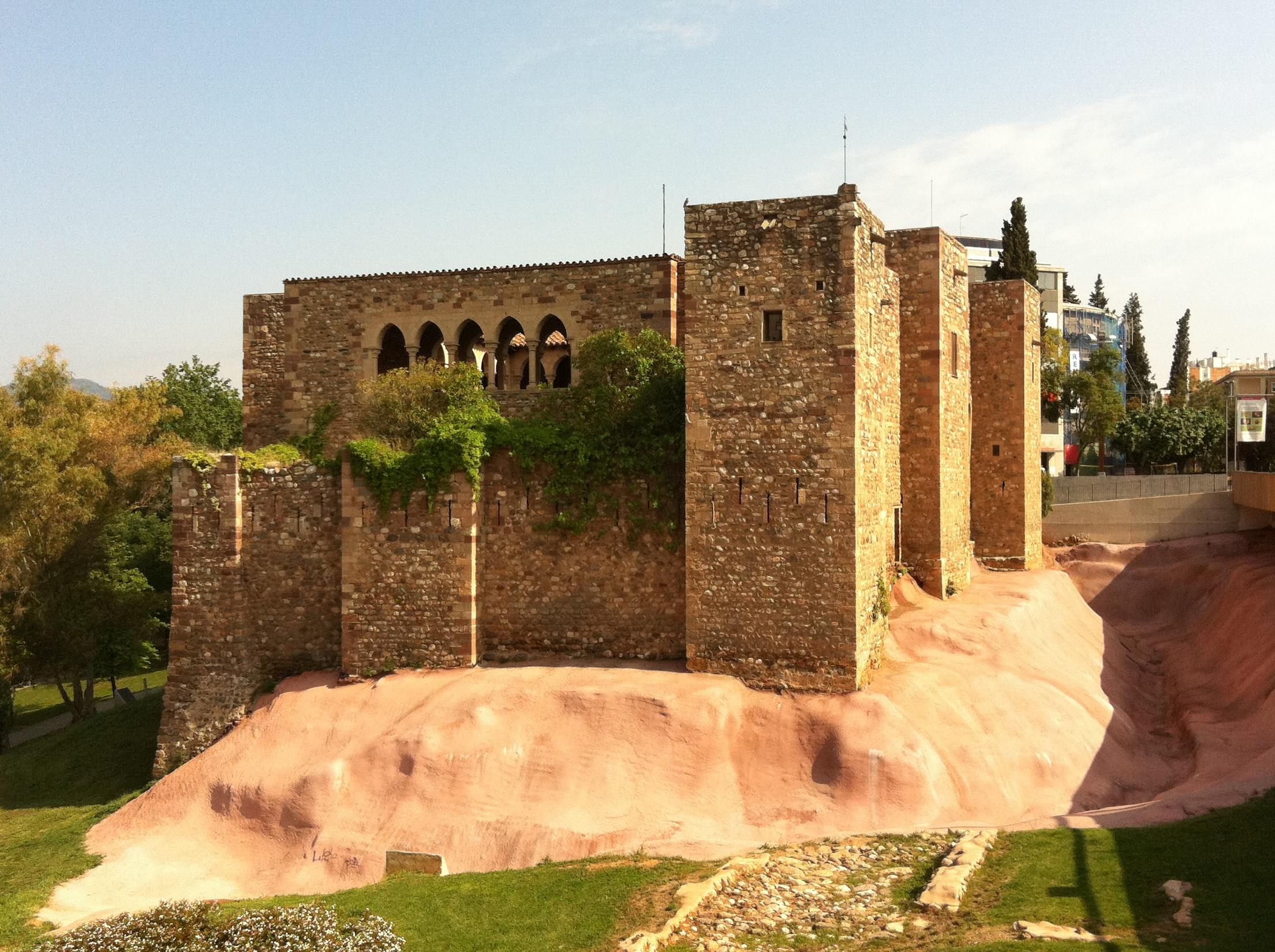 Castell-Cartoixa de Vallparadís